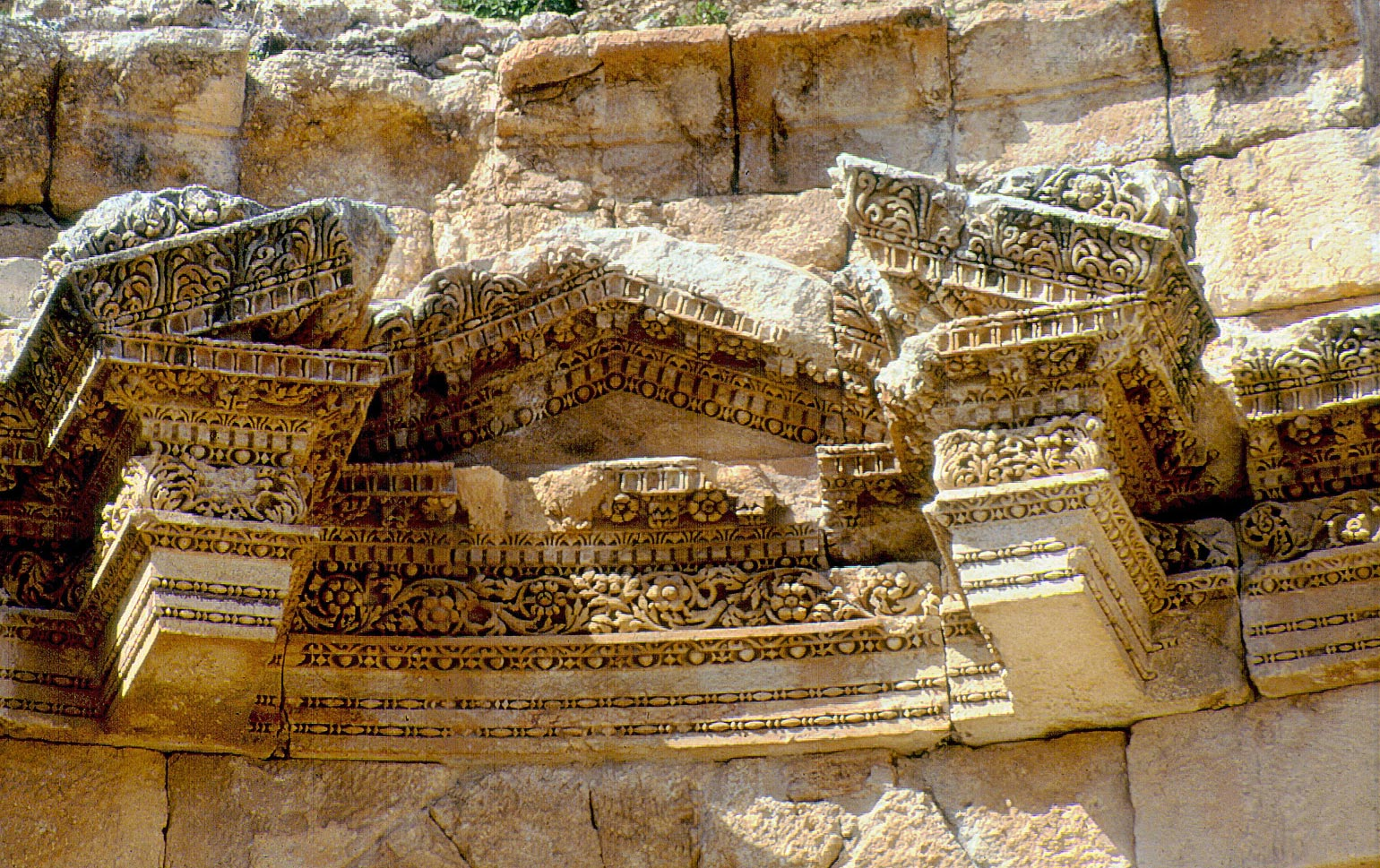 Gerasa, ninfeo, particolare della trabeazione (foto del marzo 1993)